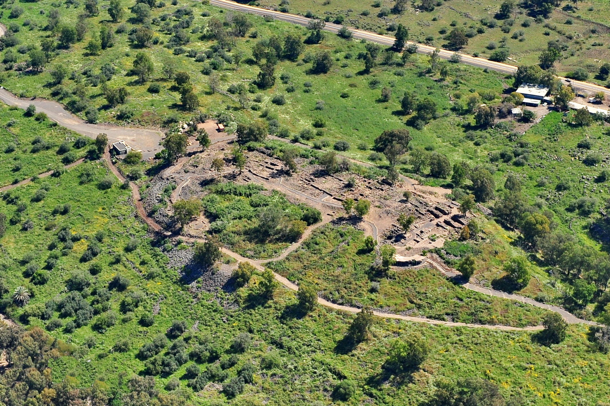 תל בית ציְדה שוכן בבקעת בית צידה בתוך שטח פארק הירדן בצפון-מזרחה של הכנרת. בשטח התל, שהיה ידוע פשוט כ"א-תל", התגלו שרידים של עיר עתיקה המזוהה כ"בית צידה" ההלניסטית.